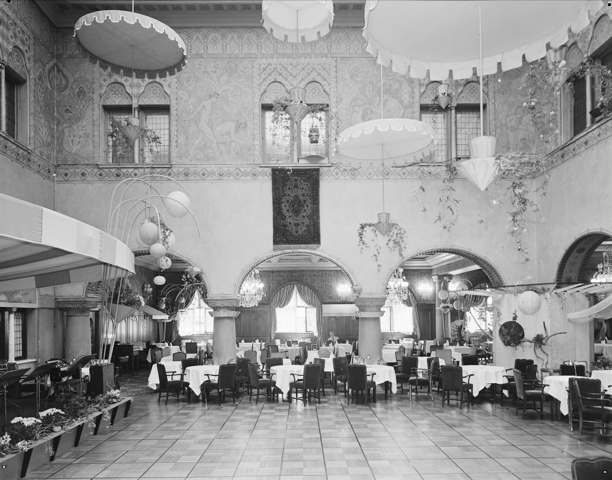 Mauriske hall, Hotel Bristol, 1959-08-13